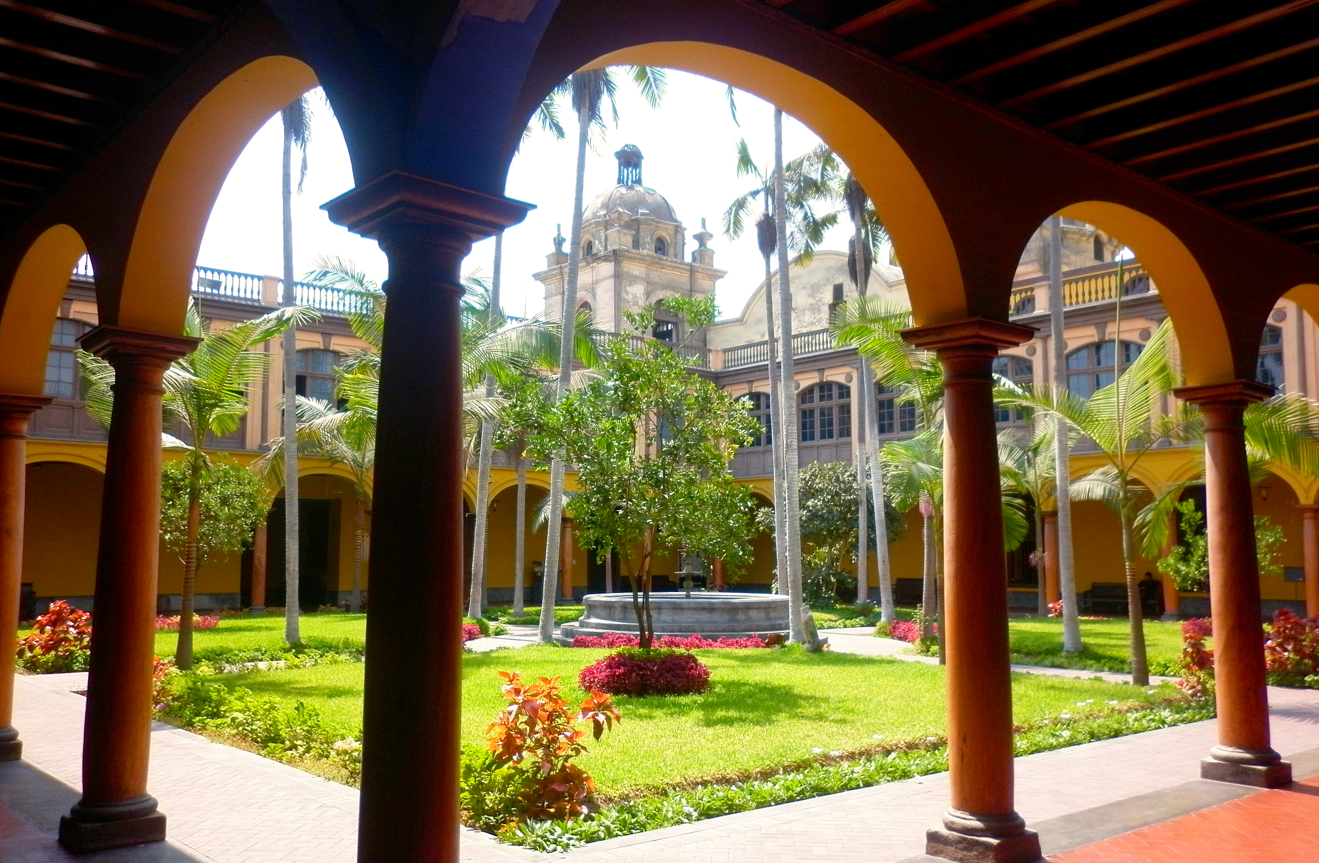 Patio de Letras de la Casona de la Universidad Nacional Mayor de San Marcos, Lima, Peru.